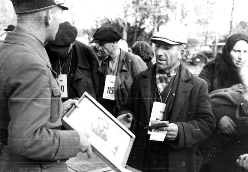 Distr. Lublin/Cholmer Land Cholmer Umsiedlung: Einsatz der Gliederungen der Partei bei der Betreuung der Cholmer Umsiedler 1940/41 English (summary and liberal translation ): Volkdeutsche "resettled" in Poland (on lands formerly occupied by Poles) are being handed framed photos of Adolf Hitler.